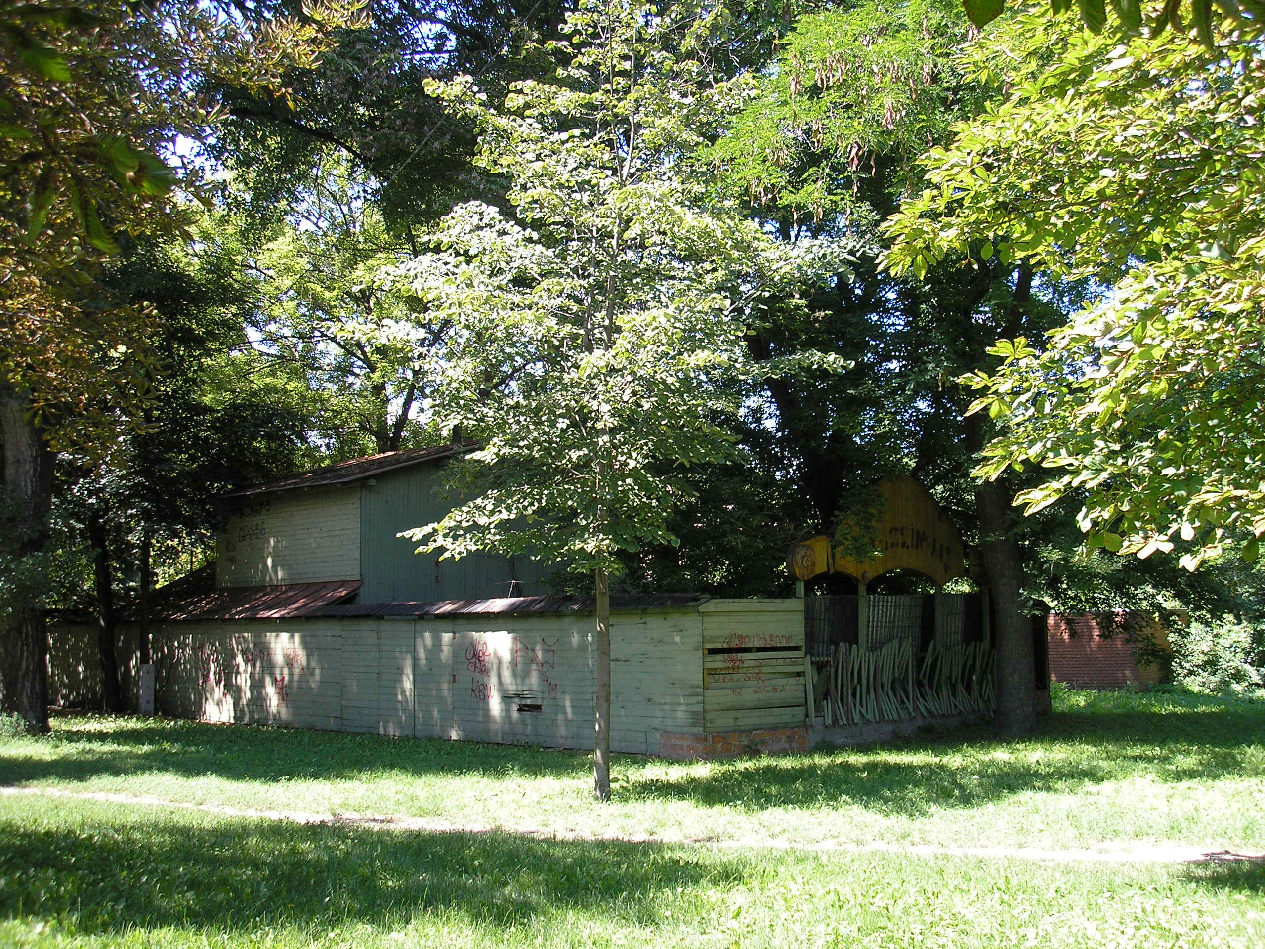 Kemény Henrik bábszínháza a Népligetben, 2009-ben (Budapest)